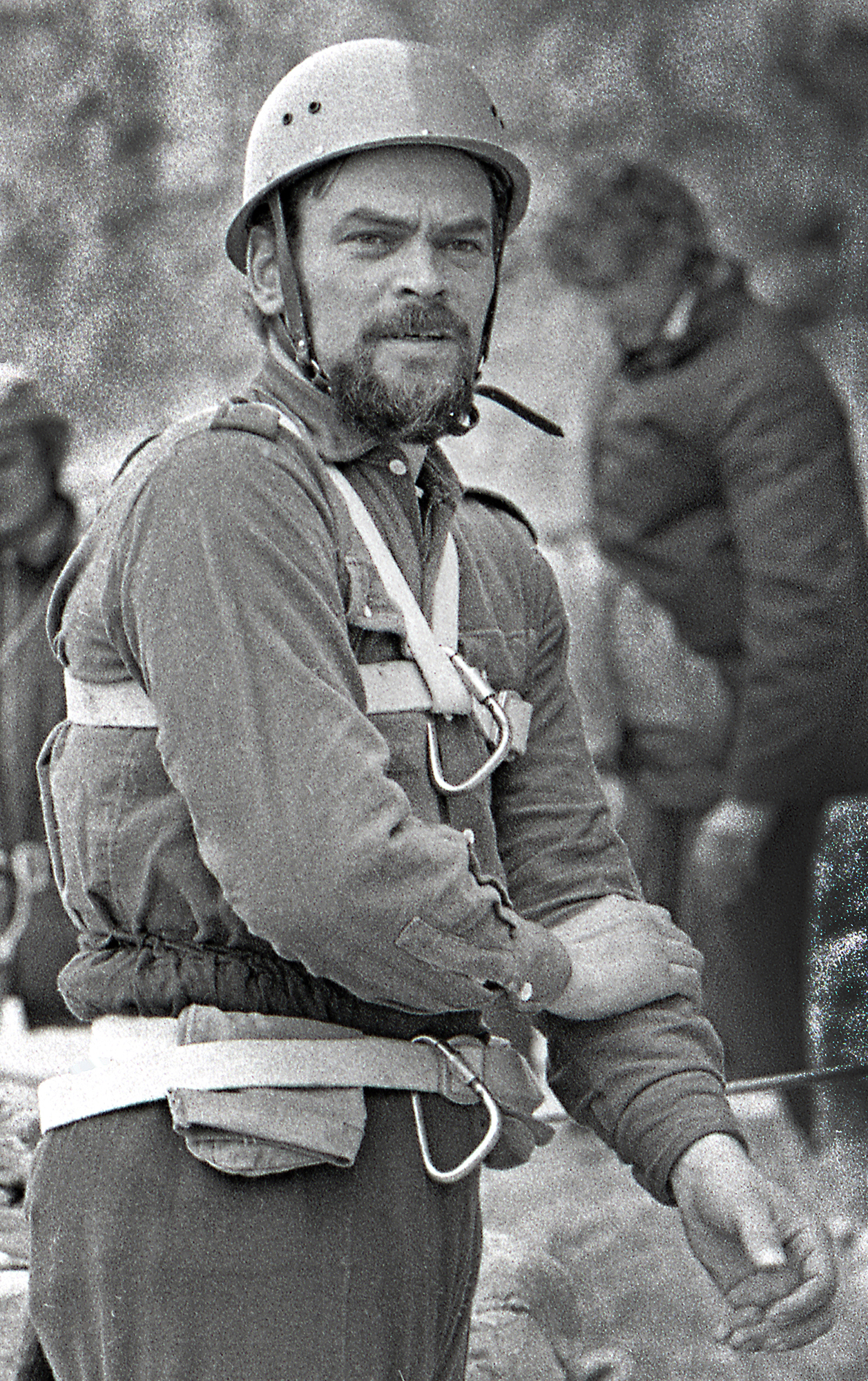 Vello Vets